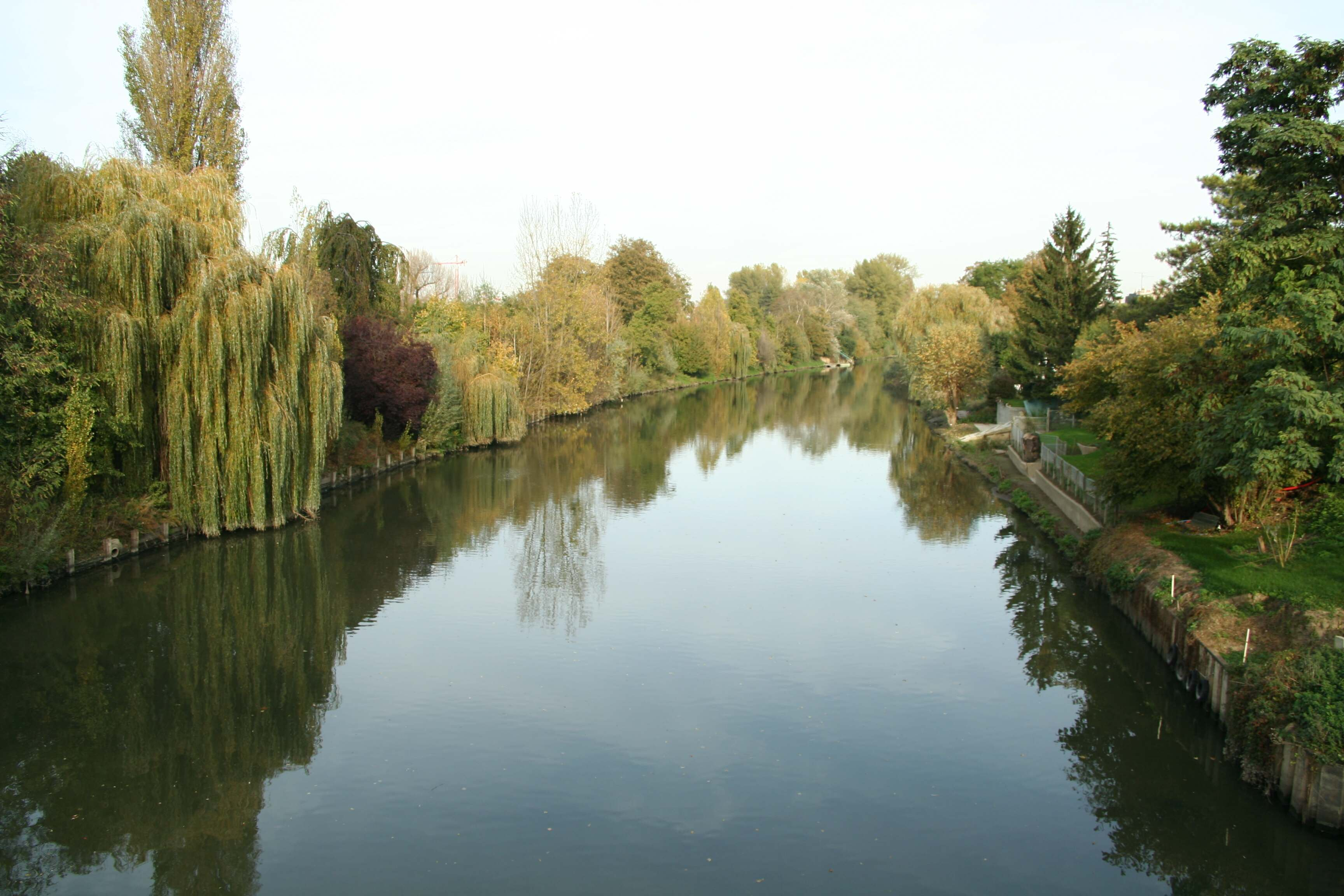 La Seine, bras de l'île de Migneaux à Poissy - Yvelines (France).